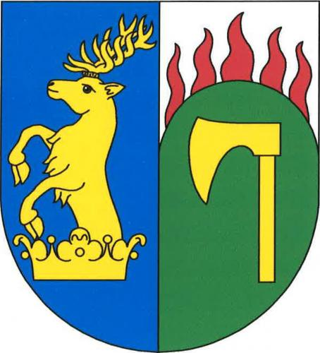 Halámky znak